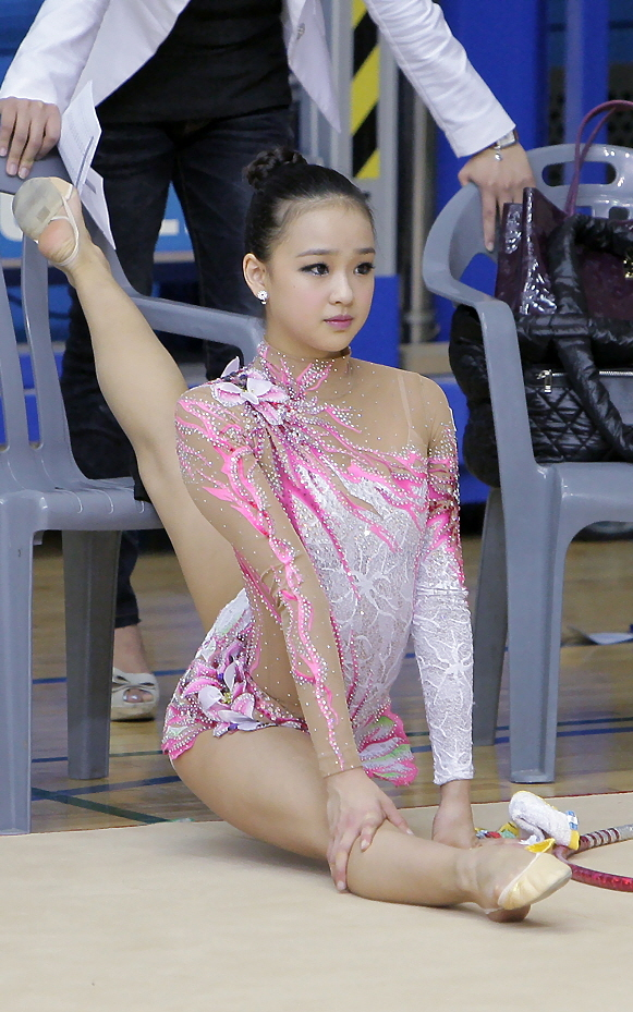 2011. 10. 10. 김포시립체육관 제 92회 전국체전 리듬체조 국민요정 손연재선수